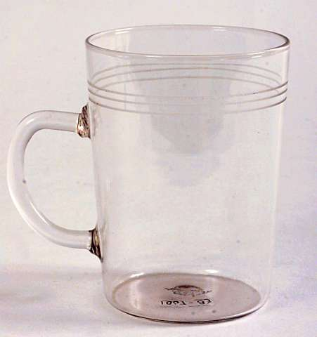 Teglass med hank, høyde 9,2 cm.